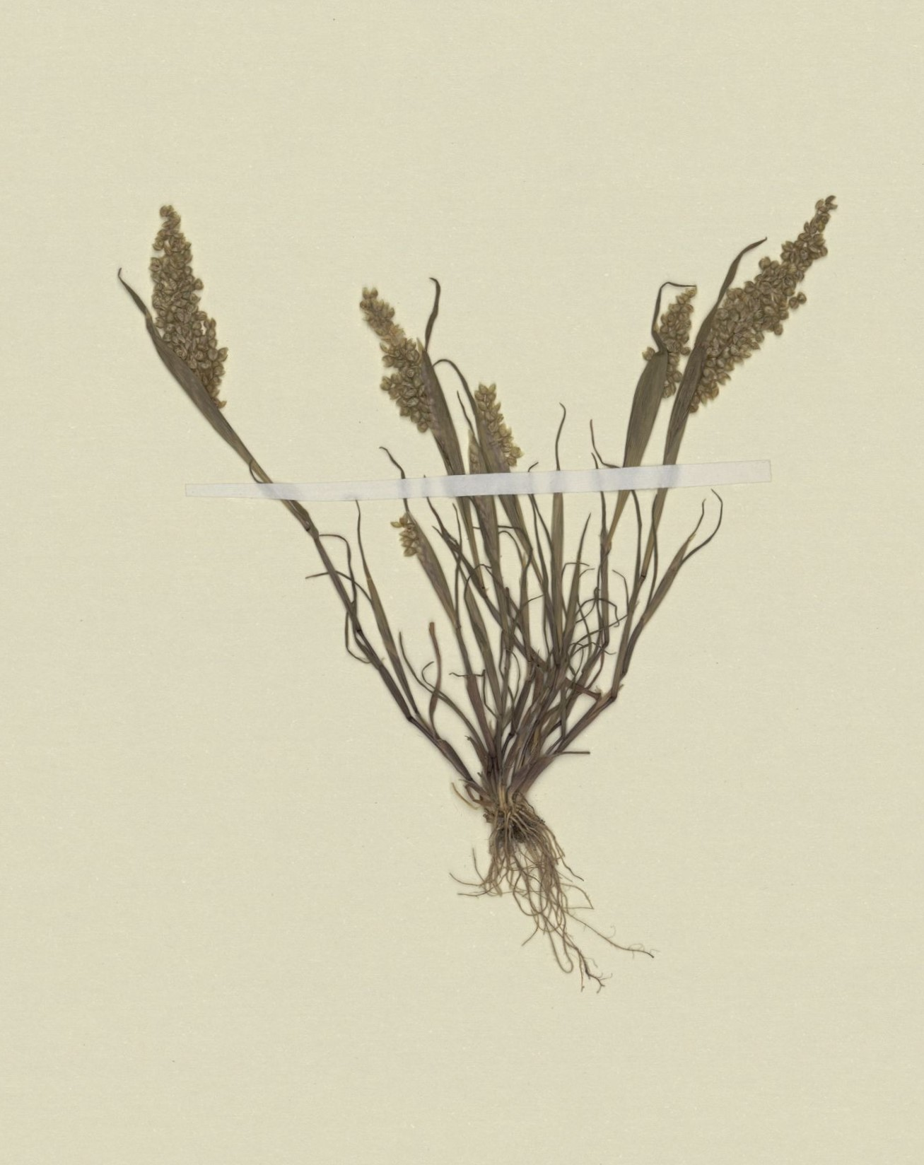 Herborización de Airopsis globosa (Thore) Desv. sinonimia de Airopsis tenella del MNHN - Museum national d'Histoire naturelle (París) Francia.